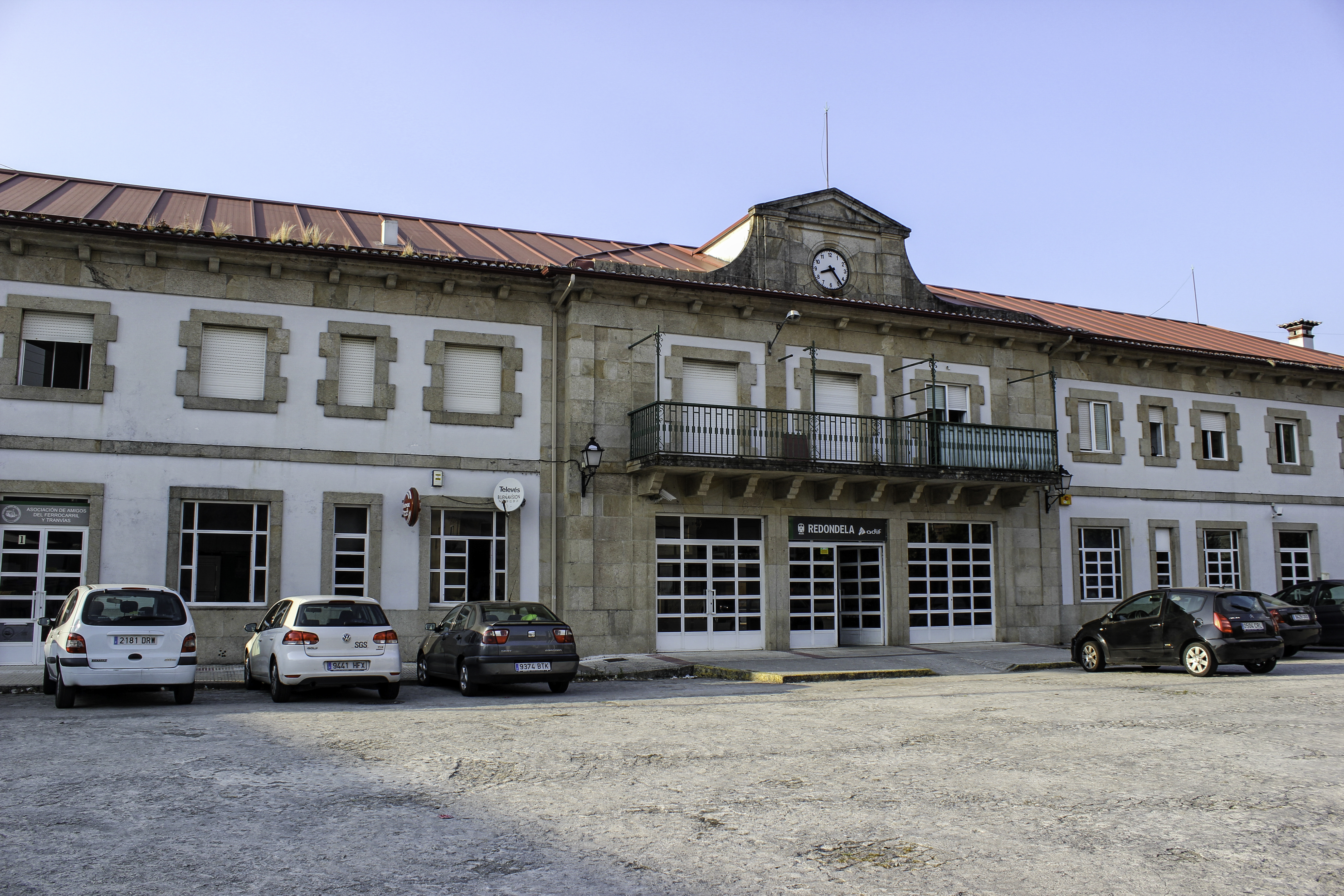 Estación de Redondela, Pontevedra.